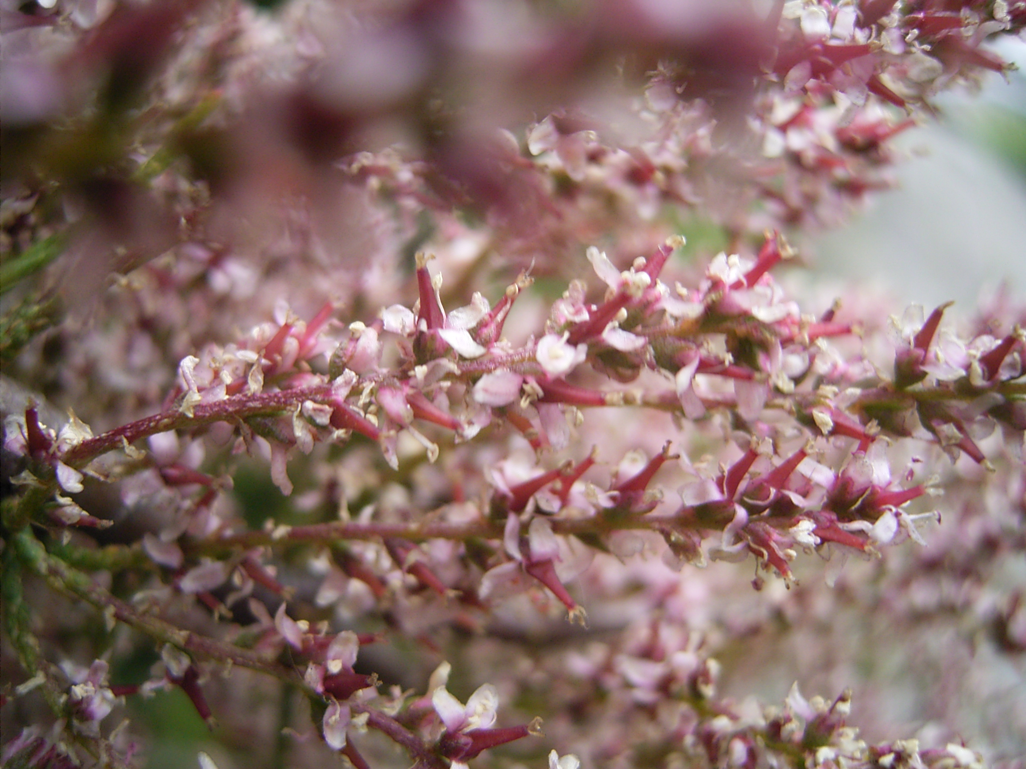 De foto toont een bloementaje van de Franse tamarisk. Ik nam deze foto op 25 mei 2005 op de Leyweg in den Haag. This photo shows a flowered branch of Tamarix gallica. I took this picture on May 25, The Hague, Netherlands.